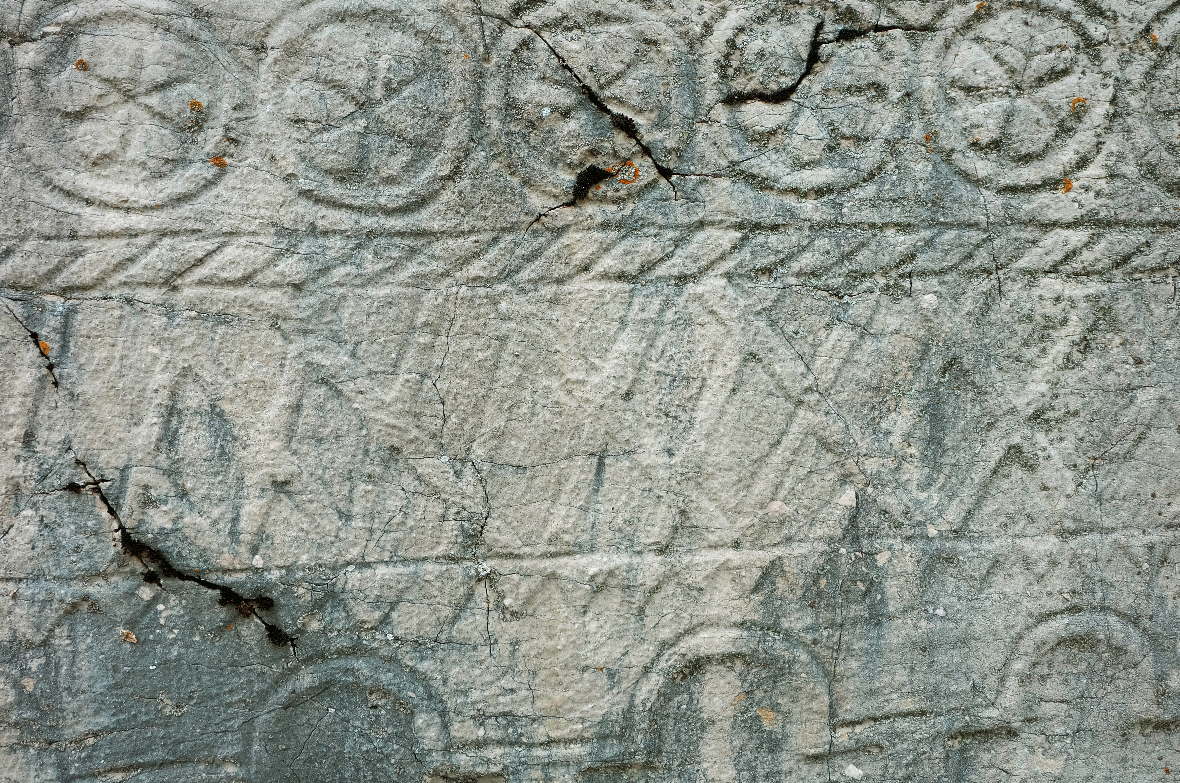 NKD293 Nekropola stećaka - Velike Grebenice